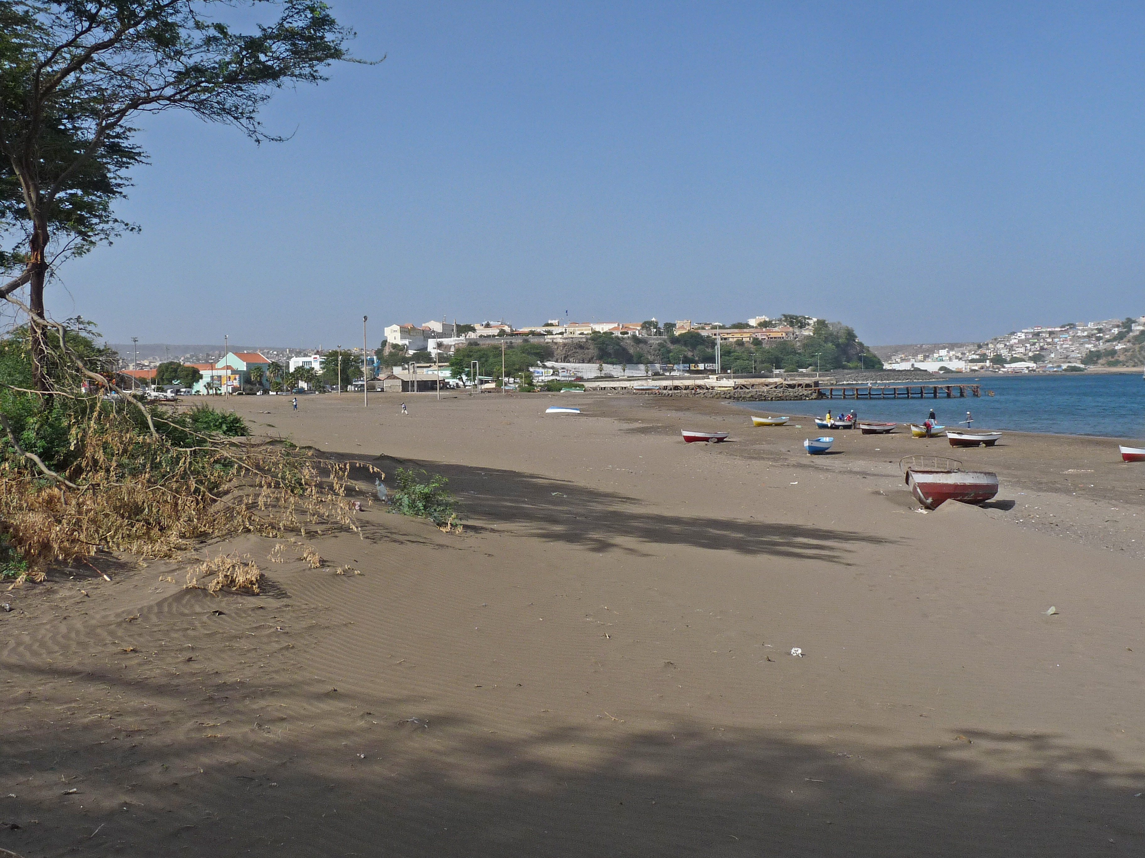 Plage de Gamboa à Praia (Cap-Vert)